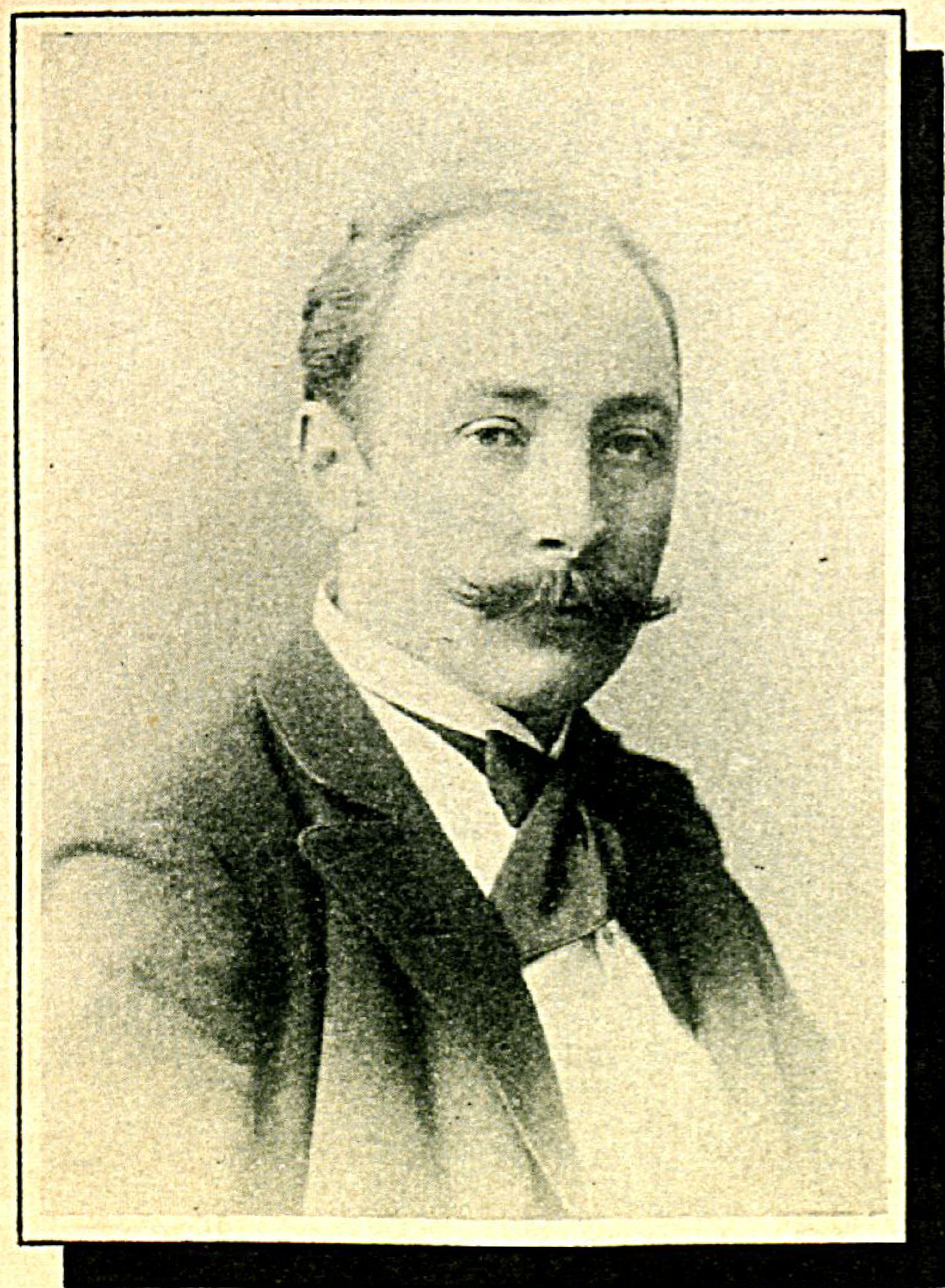 Foto des Hermann Brune um 1895, Teil-Scan des Titelblattes einer bei C.A. Gries in Hannover ca. 1985 verlegten Note: op. 30 Sieben Lieder.